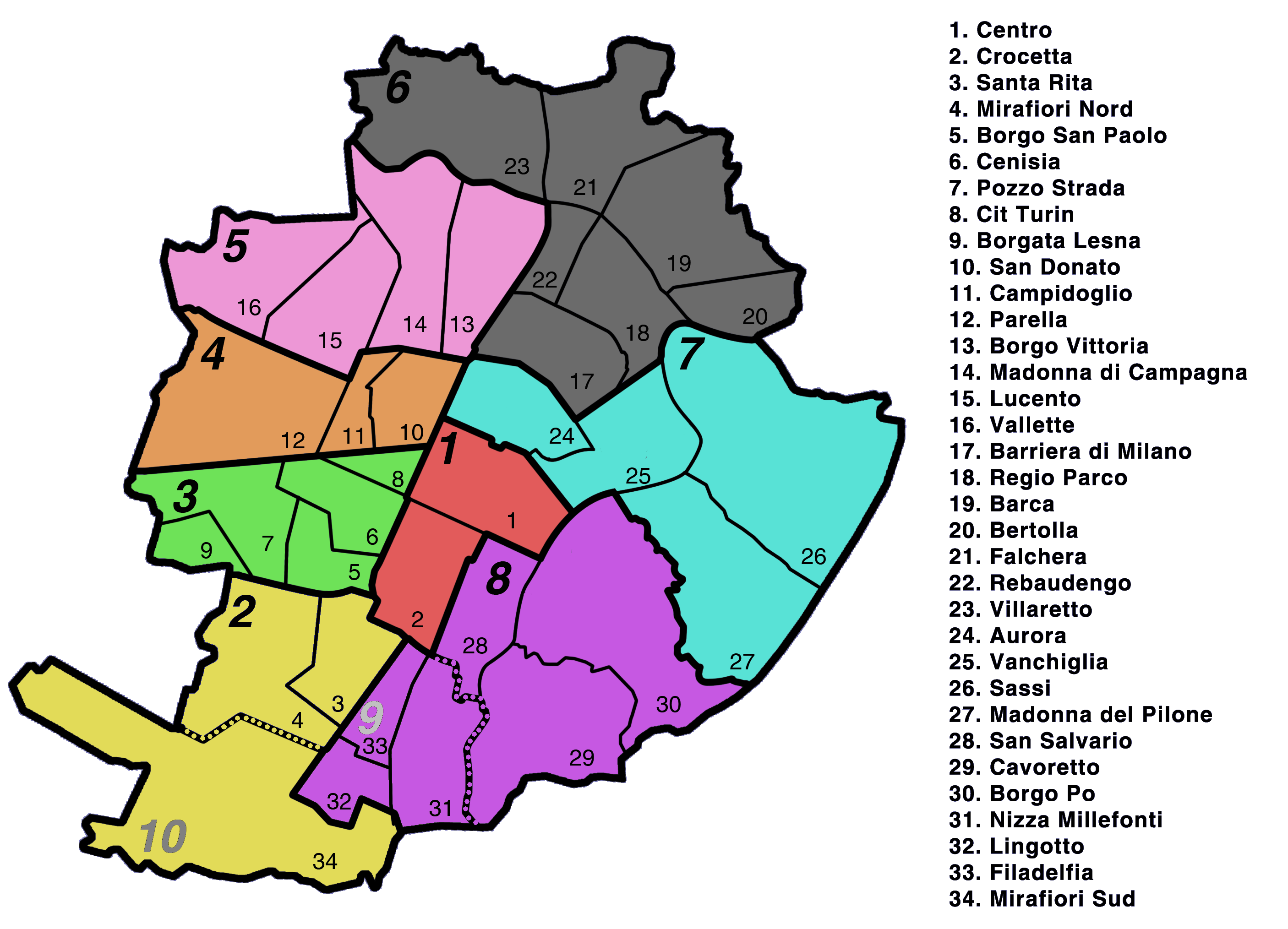 Versione aggiornata di :File:Circoscrizioni_torino.png (resta la paternità di Bruce The Deus)